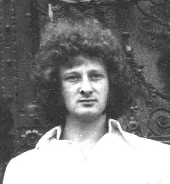 Josef (Ioji) Kappl, cu formația Phoenix, 1972-1973.